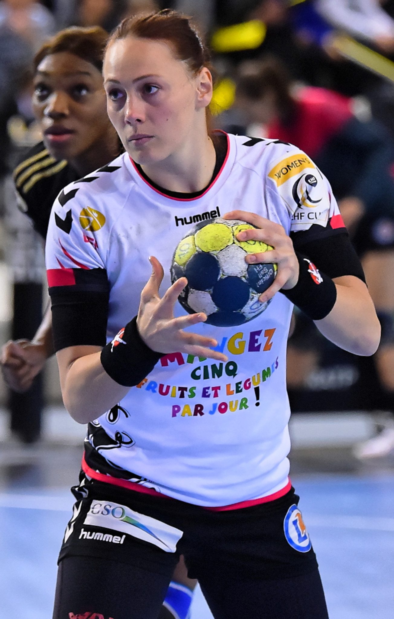 Rencontre de demie-finale de coupe de France entre Issy Paris et Brest. A Issy les Moulineaux, le 26 avril 2017.